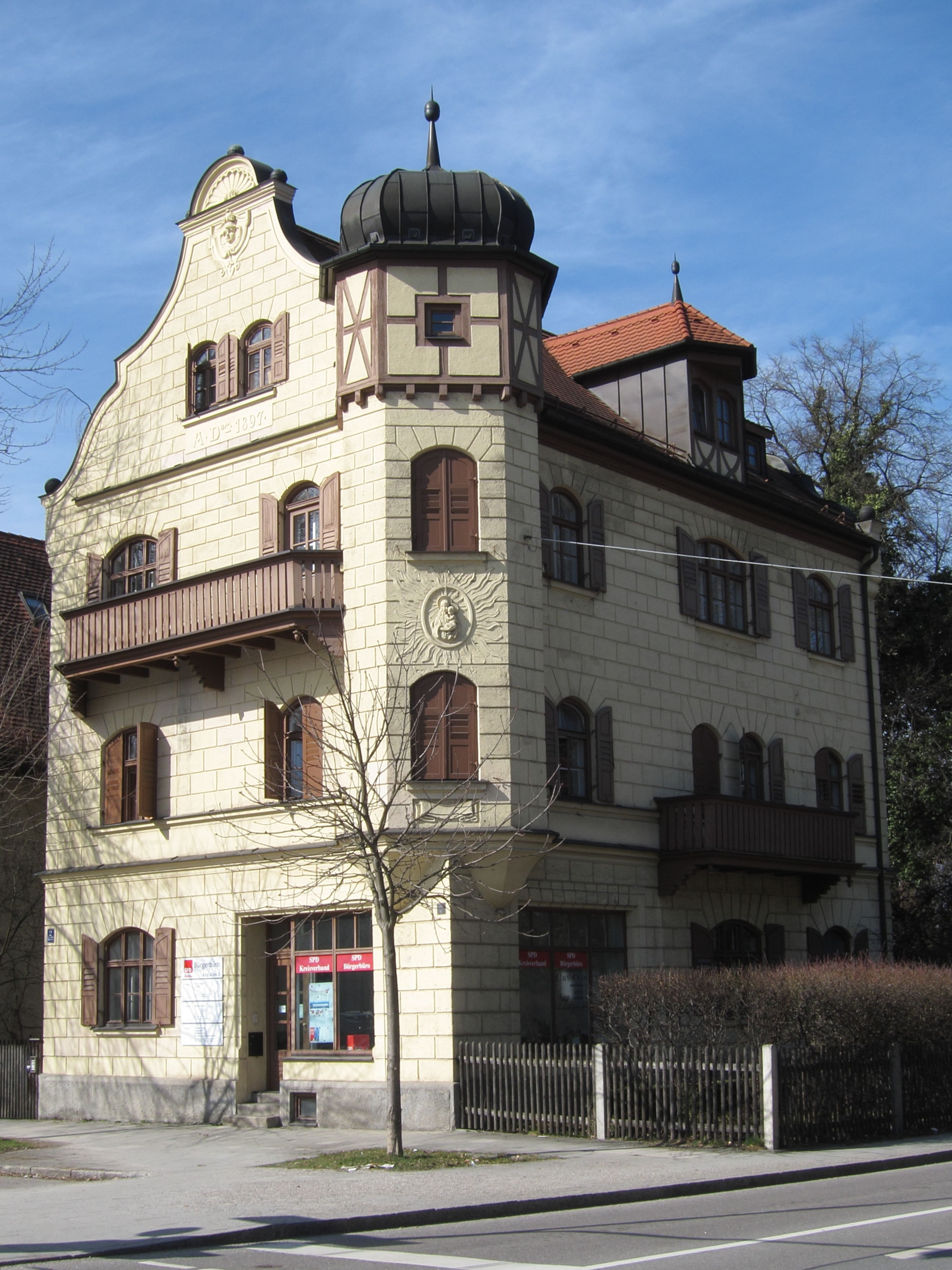 Alte Allee 2; Vorstadthaus, Neurenaissance, mit Putzgliederung, bez. 1897, von August Exter.